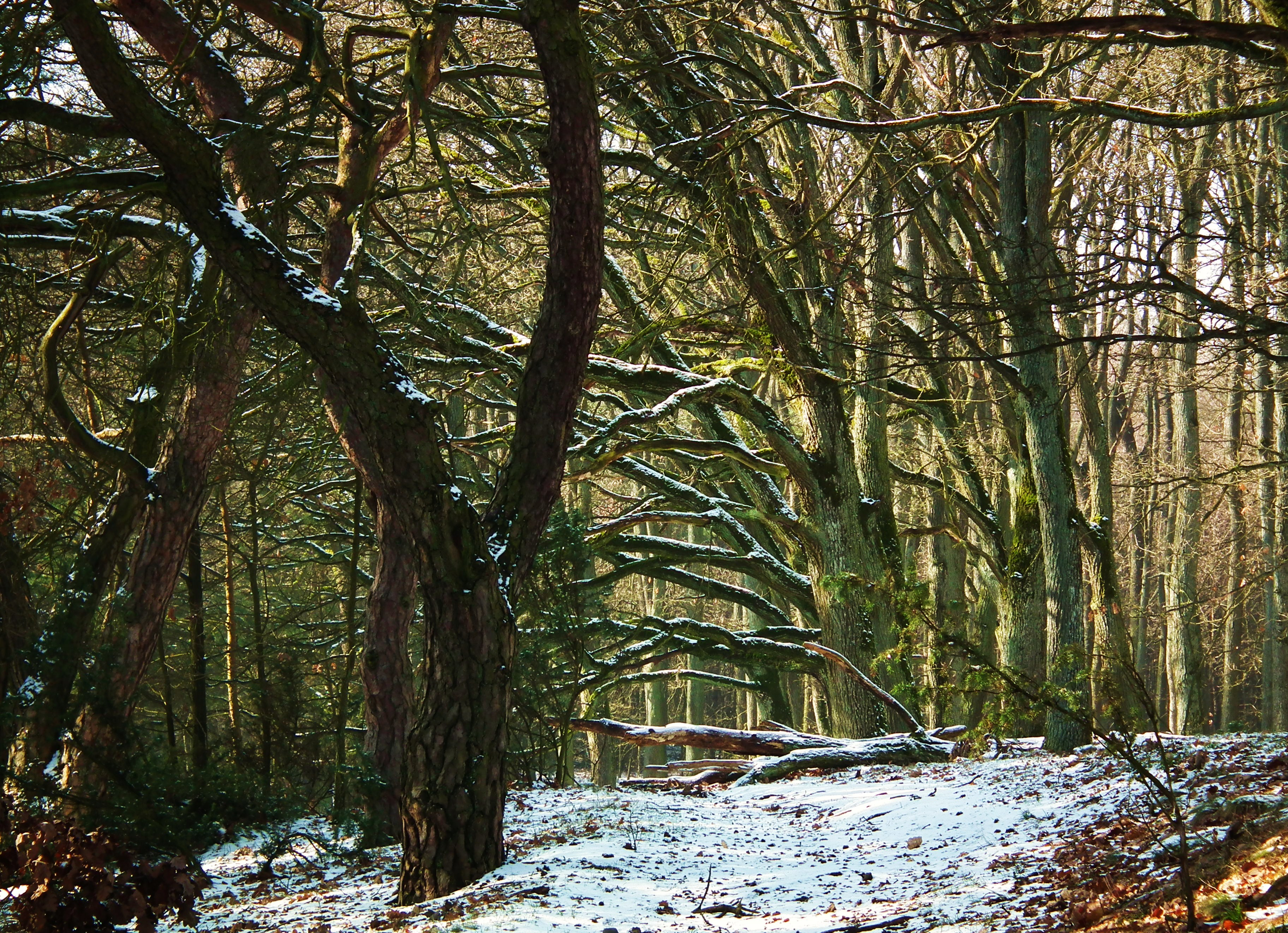 Rezerwat Złota Góra pod Koninem.